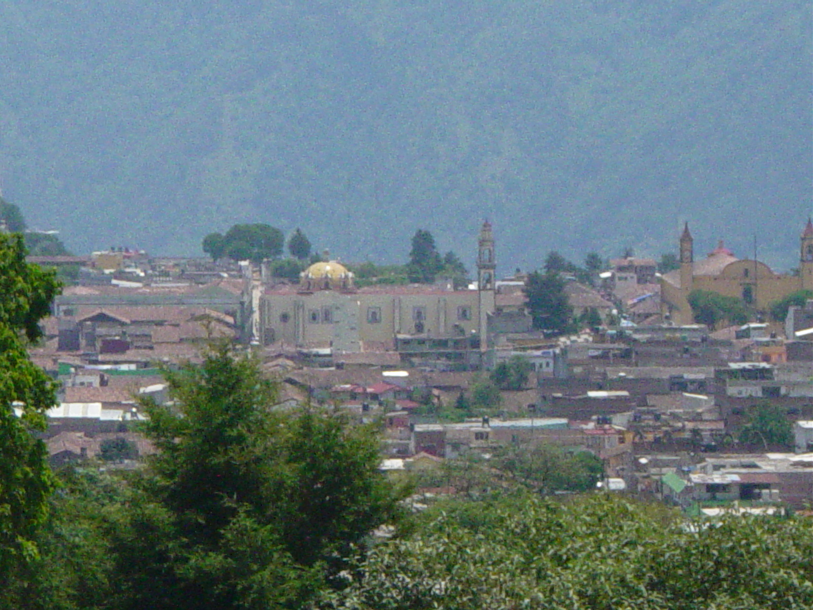 Foto de la ciudad de Zacatlán, Puebla, México. Vista desde la carretera Zacatlán-Ahuazotepec